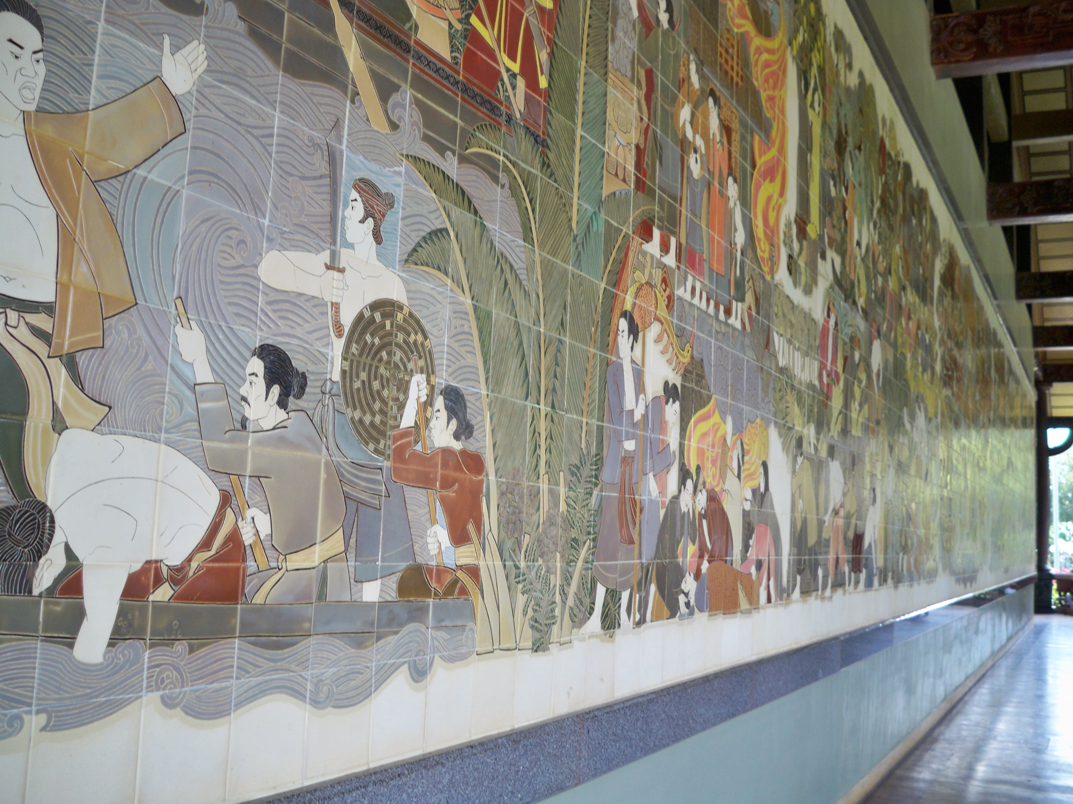 Phan Minh Châu chụp tại đền Bến Dược thực tế cùng học sinh chuyên Trần Đại Nghĩa